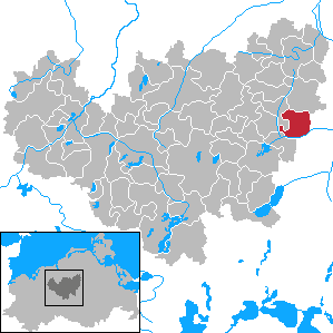 Lelkendorf in Mecklenburg-Vorpommern - District Güstrow